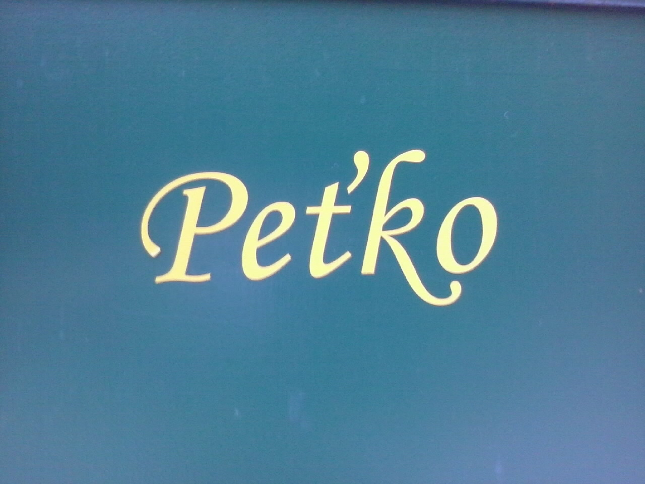 Detail mena na vozni D/u 841.